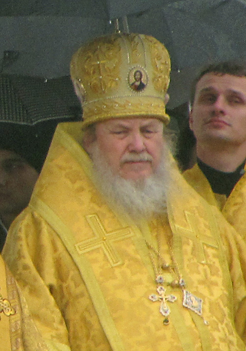 Епископ Николай во время праздничной службы в честь 200-летия Отечественной войны 1812 года возле Храма Христа Спасителя. 9 сентября 2012 года